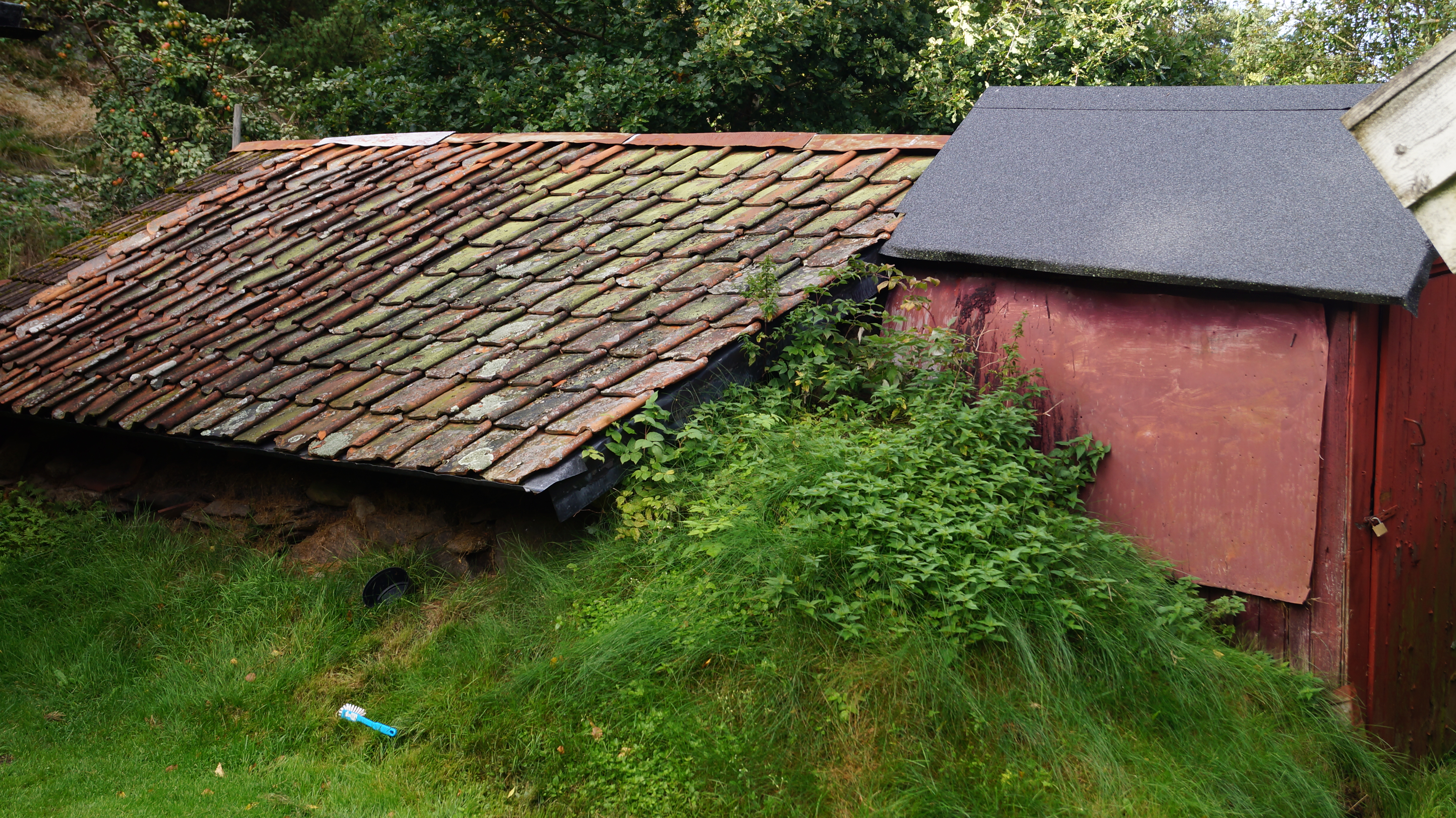 Torpet Klara ( Biskopsgården830:902) Torp Dagsverkstorp 5 Byggnader